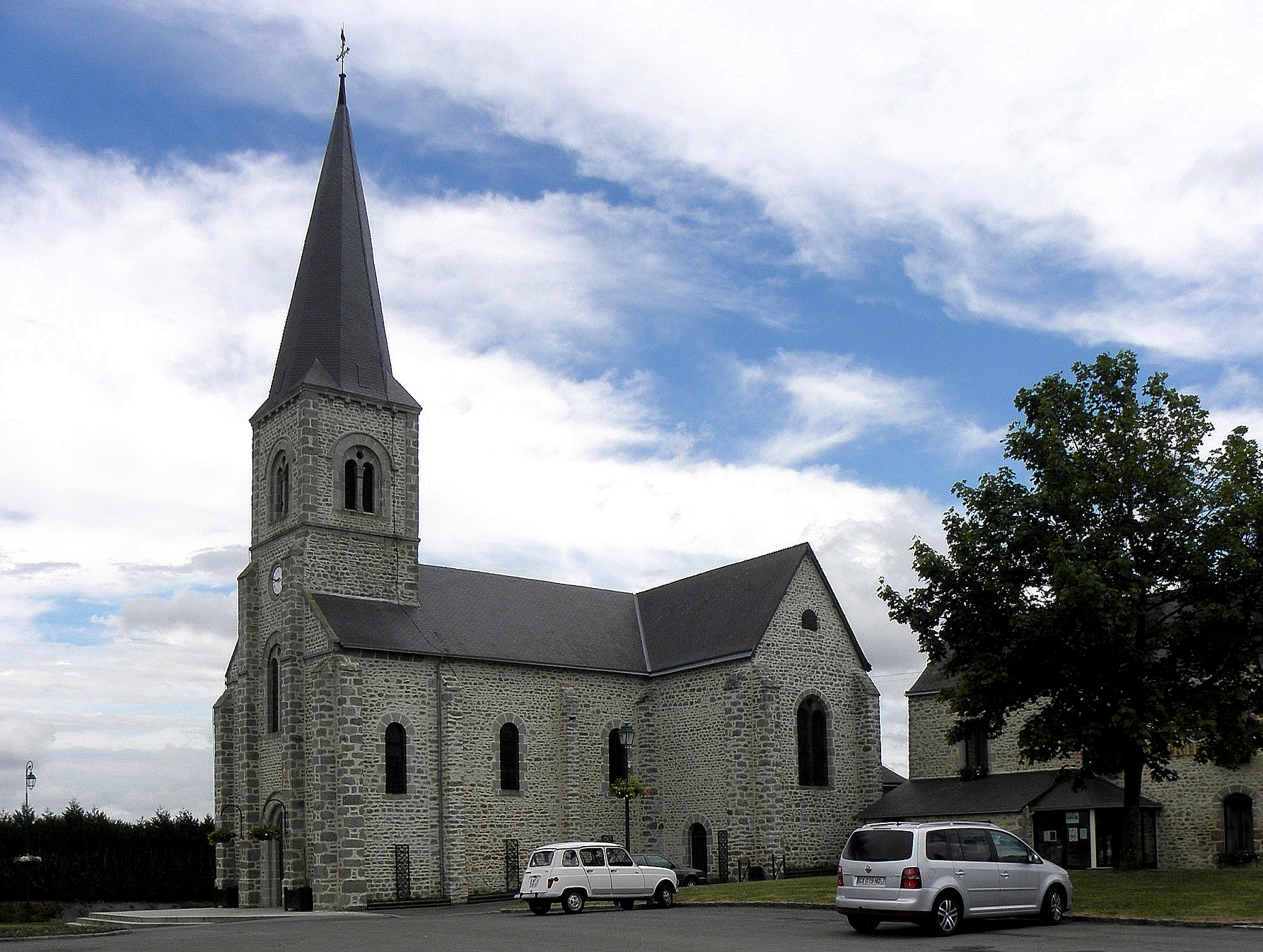 Église de Bourgnouvel en Belgeard (53).